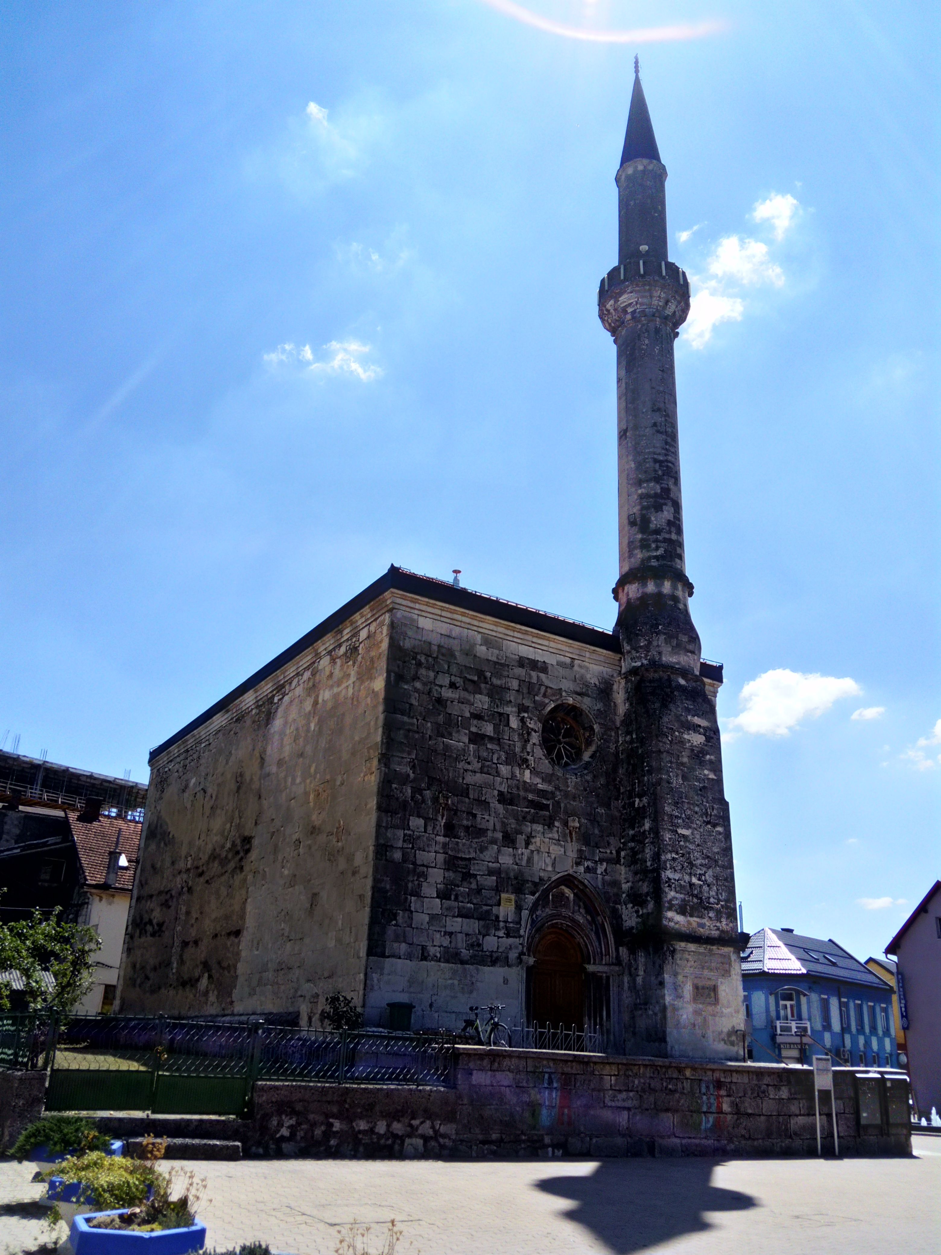 Džamija Fethija (17. 7. 2017)